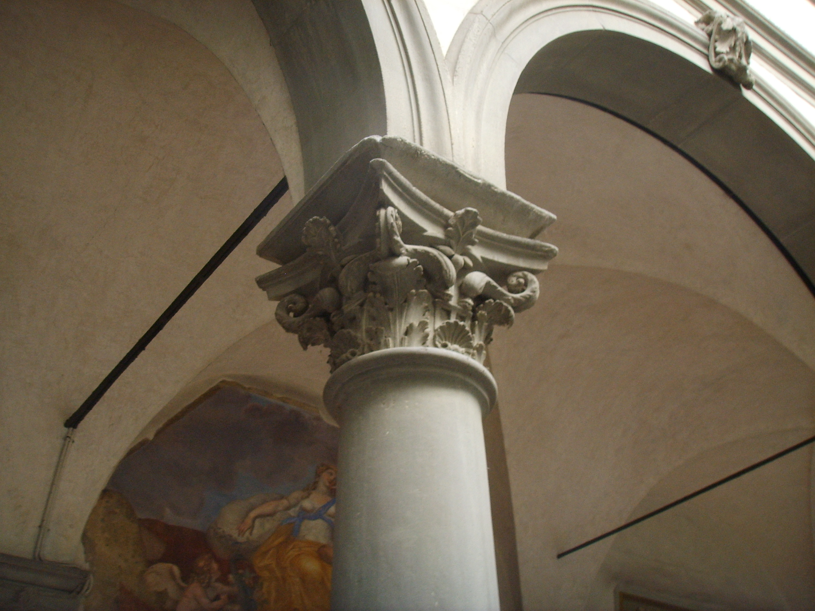 Palazzo corsini antinori, capitello